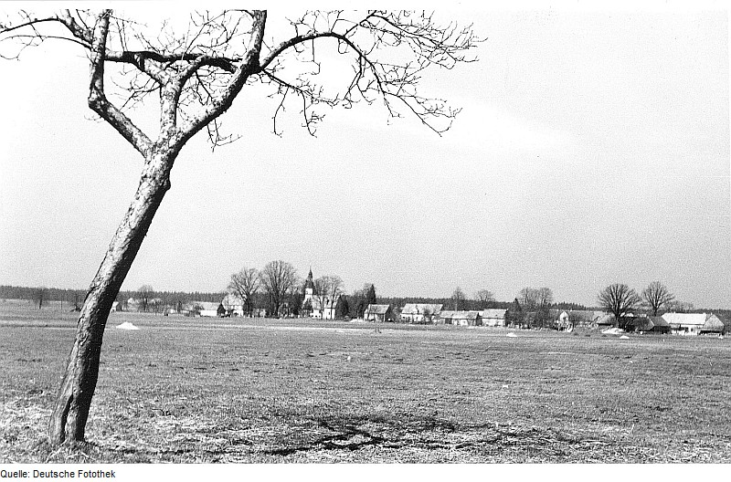 Original image description from the Deutsche Fotothek Niesky-Kosel. Blick vom ehem. Windmühlengehöft auf das Dorf